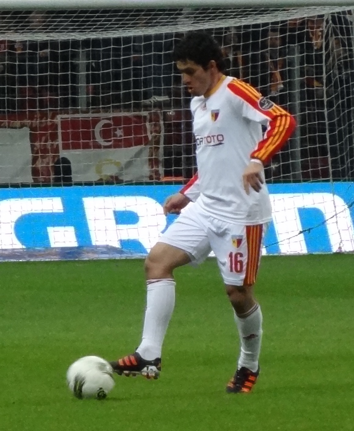 Cristian Riveros Galatasaray deplasmanında